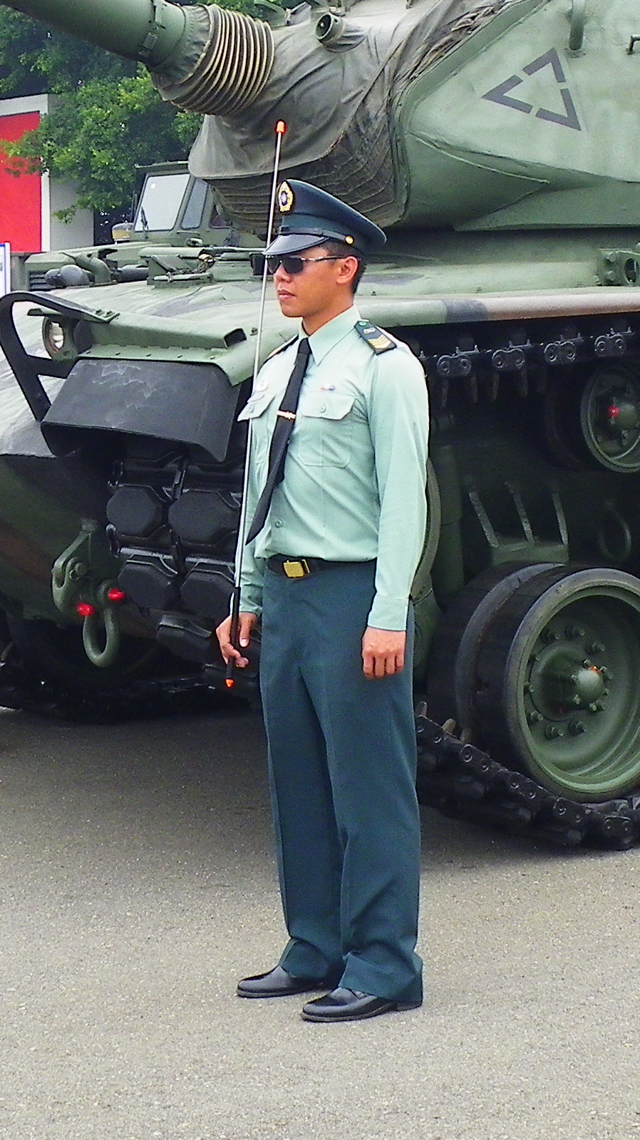 2011年成功嶺營區開放活動，着用甲式軍便服的陸軍上士，在M-60A3 TTS戰車前擔任解說。